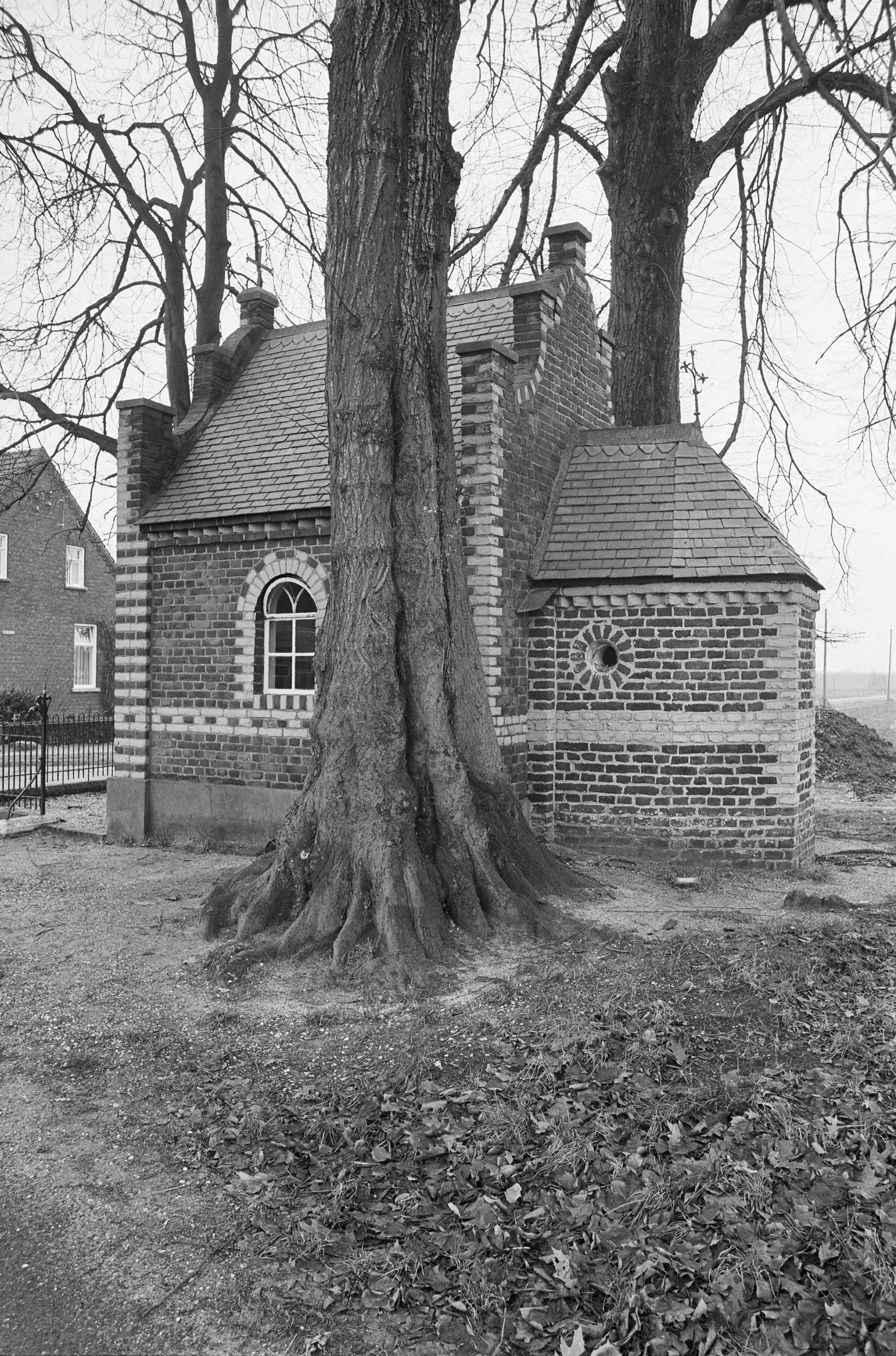 kapel